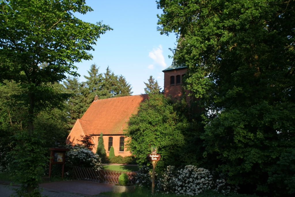 Church of Benthullen, Niedersachsen, Germany